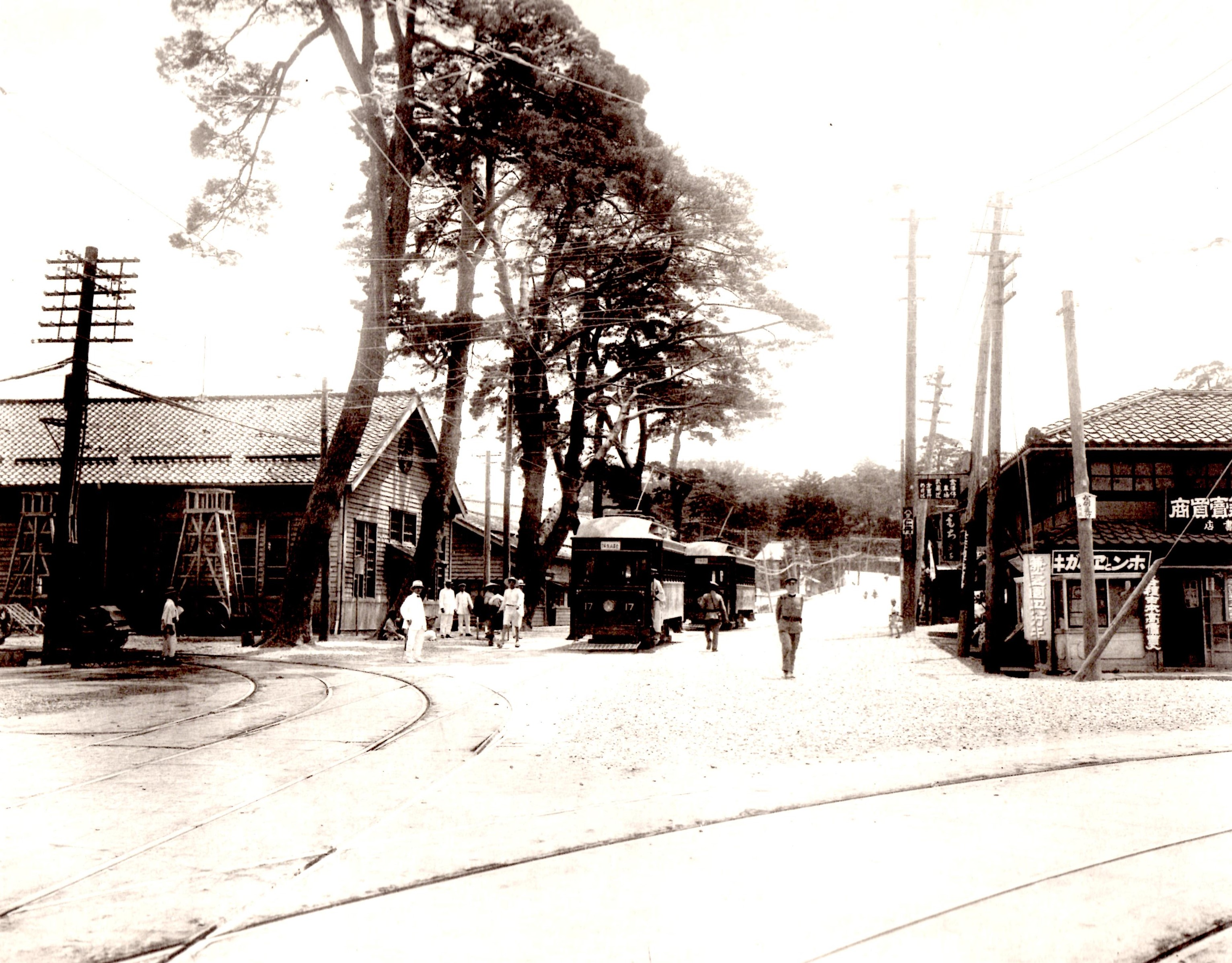 原題は「本社変電所等建築以後の光景」。大正8年7月24日撮影。